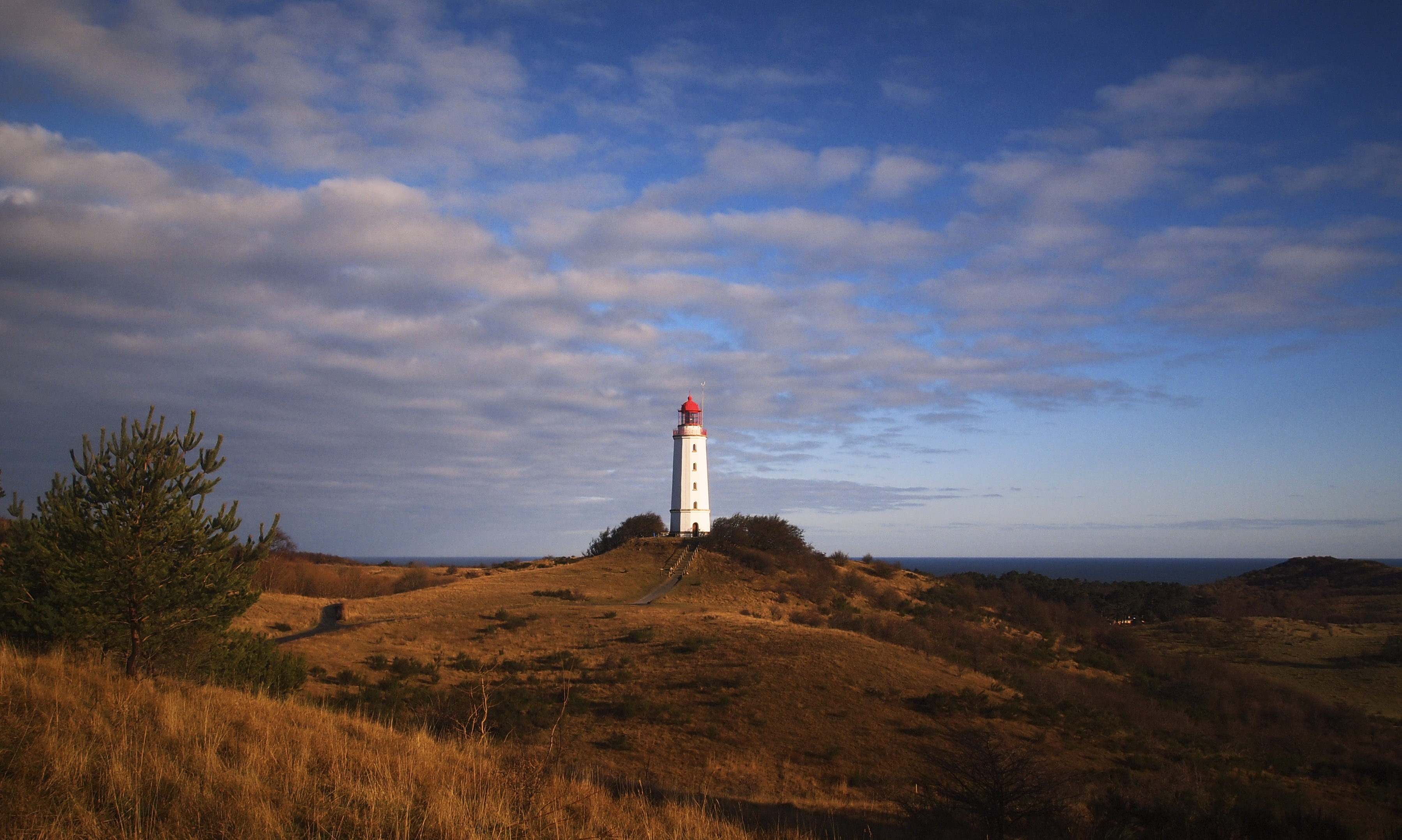 Der Nationalpark Vorpommersche Boddenlandschaft umfasst Teile der Ostsee und mehrere Inselabschnitte der deutschen Ostseeinseln. Hiddensee selbst hat außerdem Vogelschutzgebiete und eigene Naturschutzgebiete. Am nördlichen Ende der Insel steht der Leuchtturm Dornbusch aus dem Jahre 1888. Es ist ein wunderschönes Leuchtfeuer und das Wahrzeichen dieser autofreien, grünen Insel.